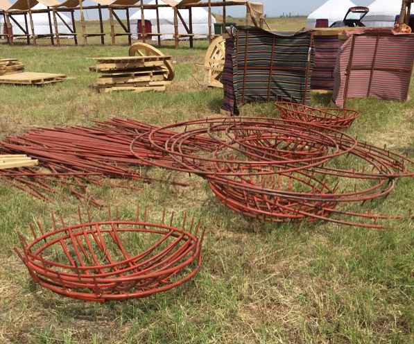 Modern skeleton of a yurt from metal